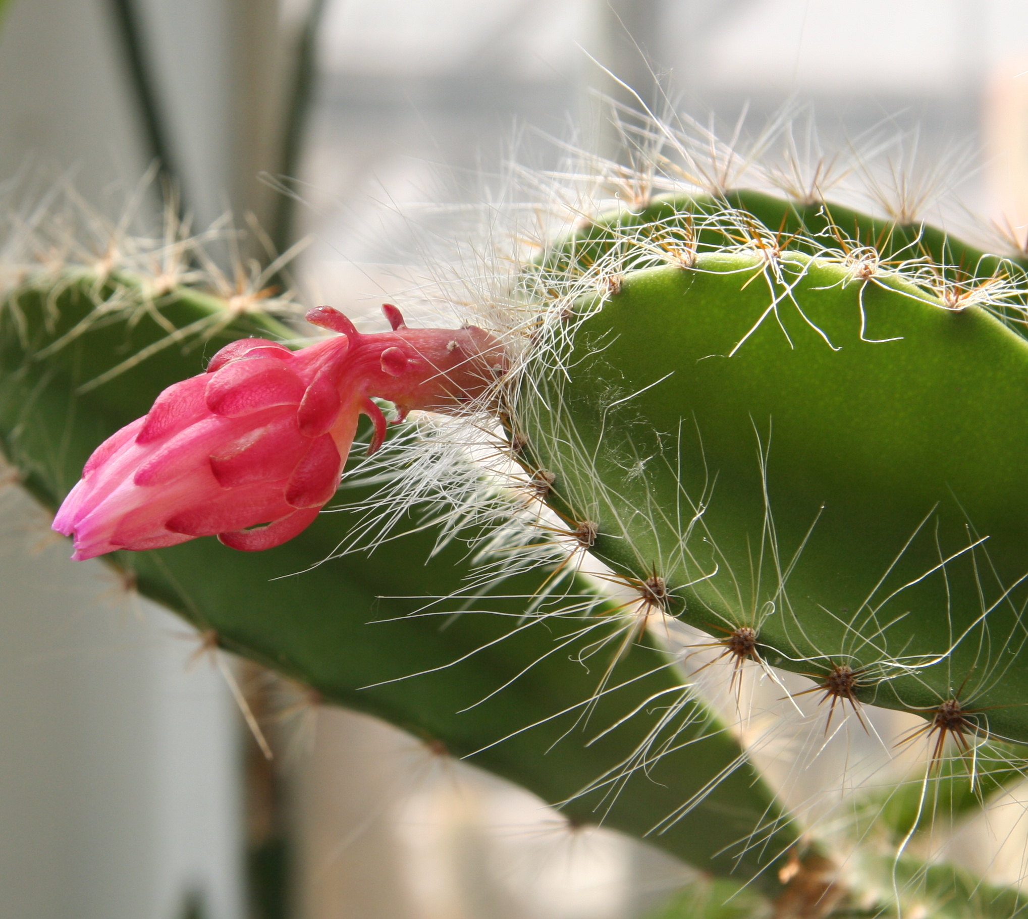 Weberocereus frohningiorum in der Sukkulenten-Sammlung Zürich